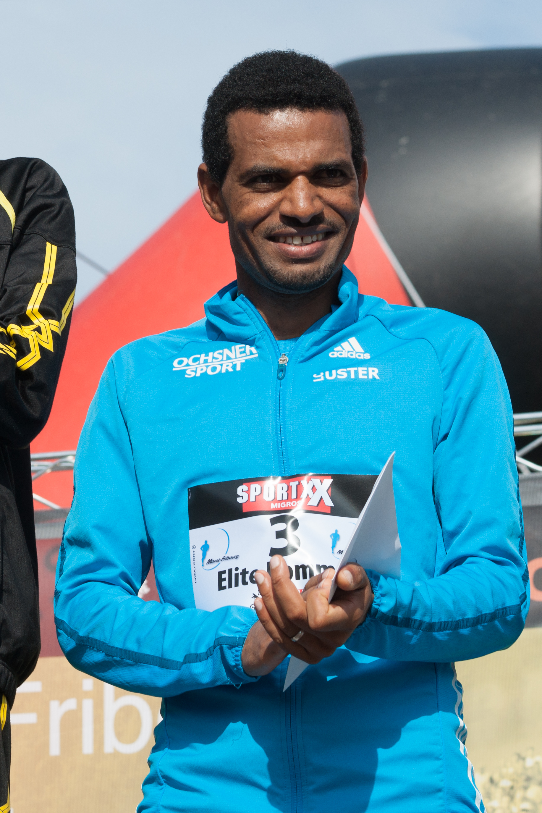 Morat Fribourg 2014 - Abraham Tadesse (podium)